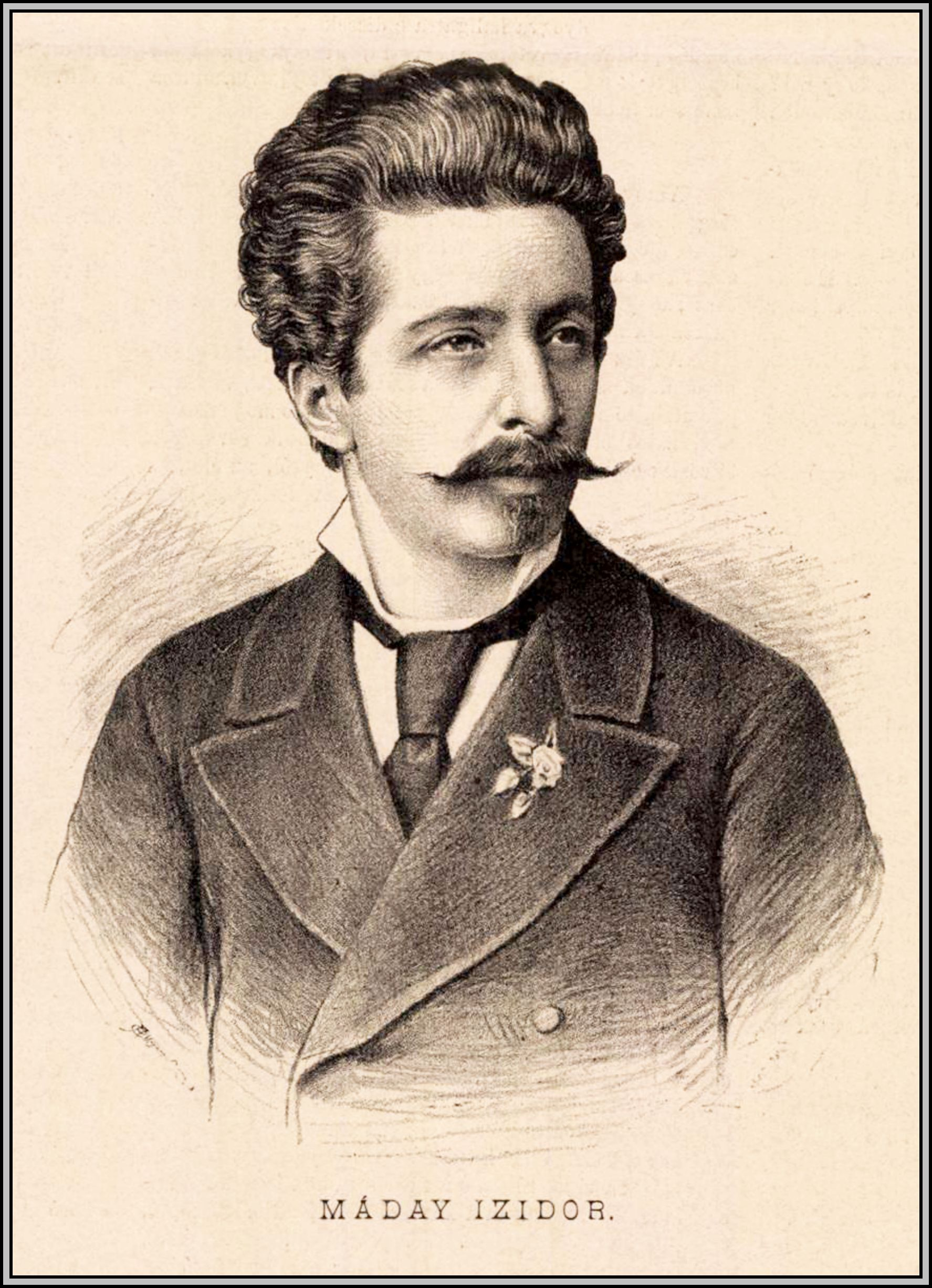 Marosi Máday Izidor (Pest, 1839. július 26. – Budapest, 1925. április 3.) miniszteri tanácsos, közgazdasági író.